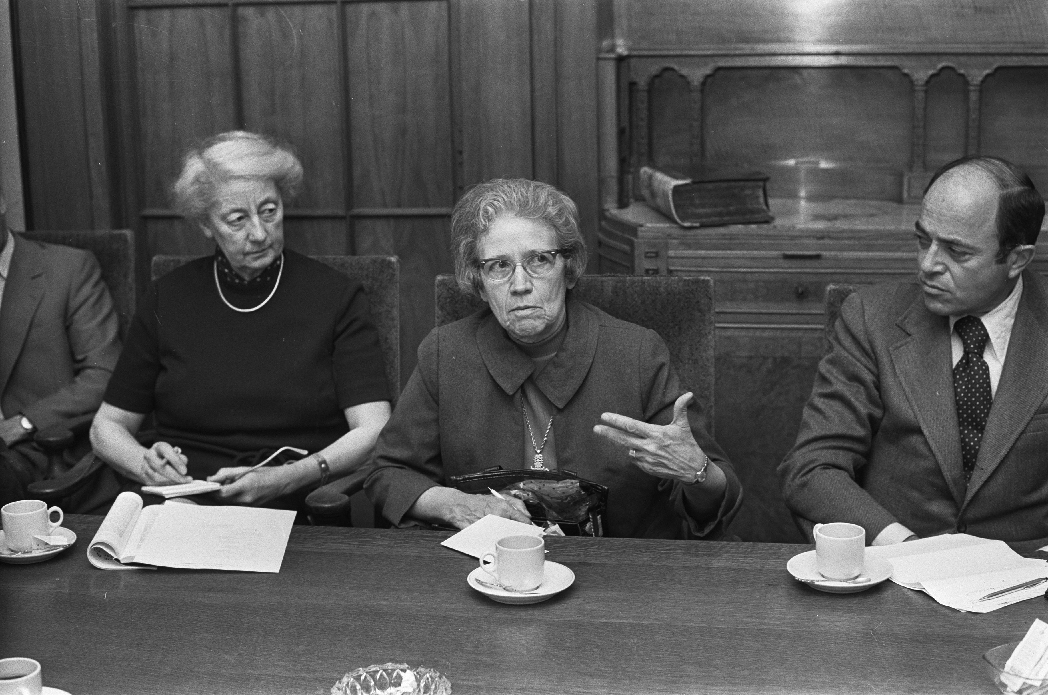 Collectie / Archief : Fotocollectie Anefo Reportage / Serie : [ onbekend ] Beschrijving : Delegatie van Amerikaanse Raad van Kerken spreekt met Nederlandse Kerken over bombardementen in Vietnam, Tobin (tweede links) en Rabbijn Leonard Beerman (r) Datum : 9 januari 1973 Trefwoorden : BOMBARDEMENTEN, KERKEN, delegaties Instellingsnaam : Raad van Kerken in Nederland Fotograaf : Croes, Rob C. / Anefo Auteursrechthebbende : Nationaal Archief Materiaalsoort : Negatief (zwart/wit) Nummer archiefinventaris : bekijk toegang 2.24.01.05 Bestanddeelnummer : 926-1450